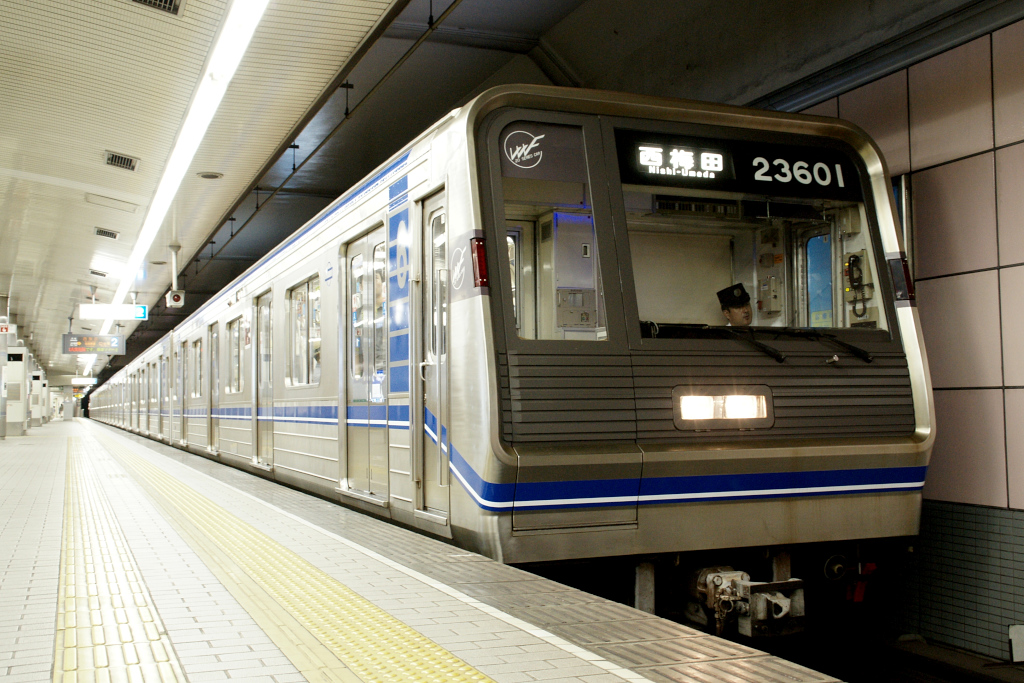 23系車両リニューアル車です。 玉出駅にて 2012年8月